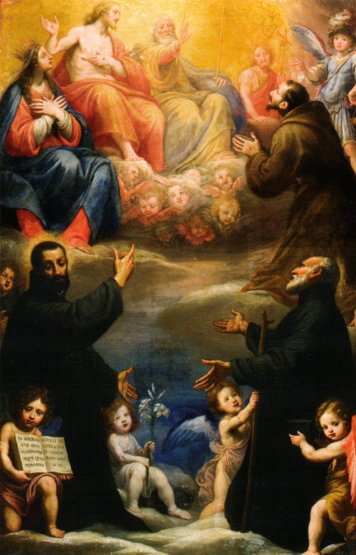 i santi gaetano di thiene, andrea avellino, francesco d'asisi adoranti la trinità, la madonna, san giovanni battista e san michele arcangelotitle QS:P1476,it:"i santi gaetano di thiene, andrea avellino, francesco d'asisi adoranti la trinità, la madonna, san giovanni battista e san michele arcangelo" label QS:Lit,"i santi gaetano di thiene, andrea avellino, francesco d'asisi adoranti la trinità, la madonna, san giovanni battista e san michele arcangelo"